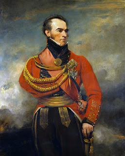 Portrait